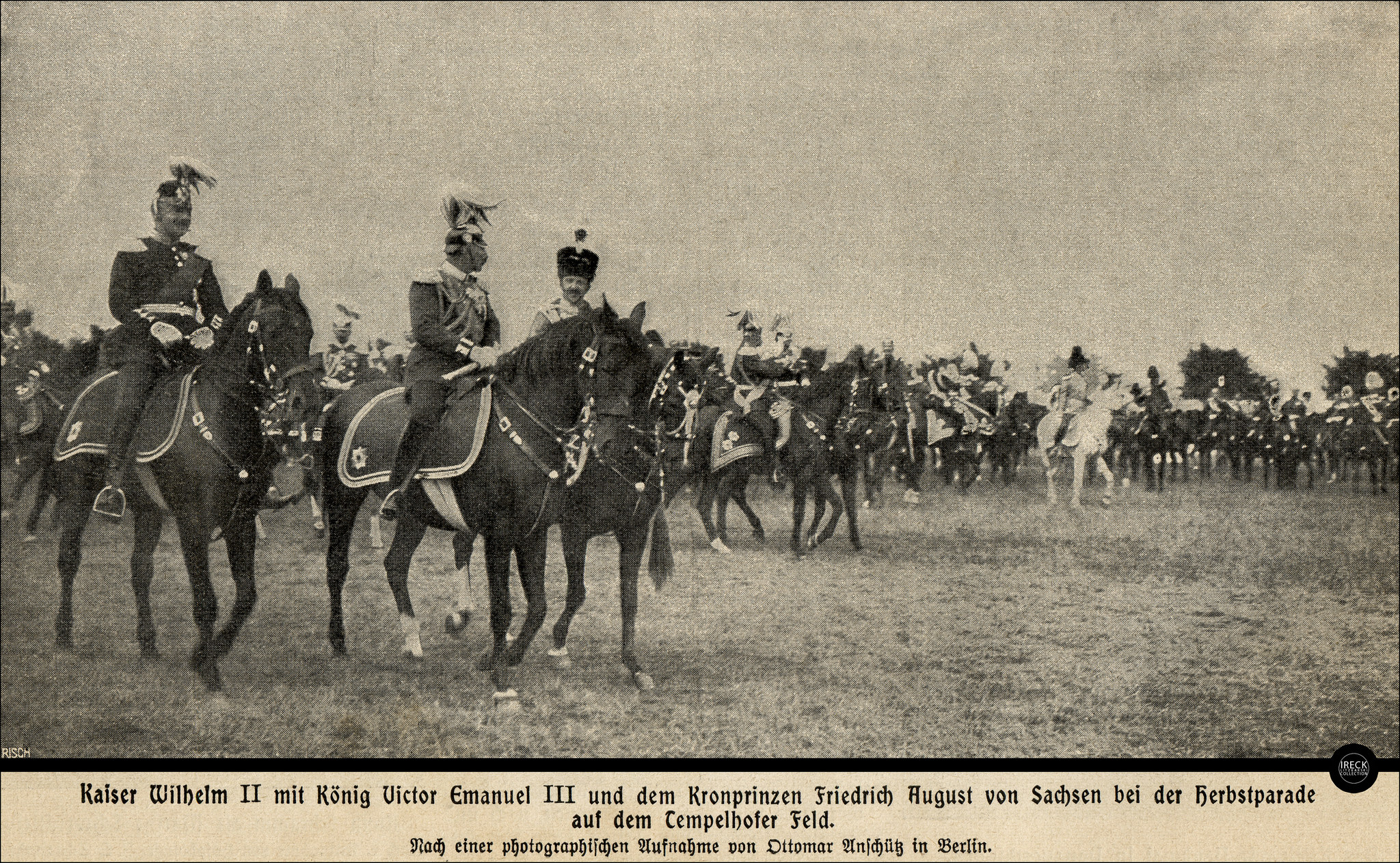 Rivista in onore a Vittorio Emanuele III con Guglielmo II di Germani e Re Federico Augusto III di Sassonia nel 1902